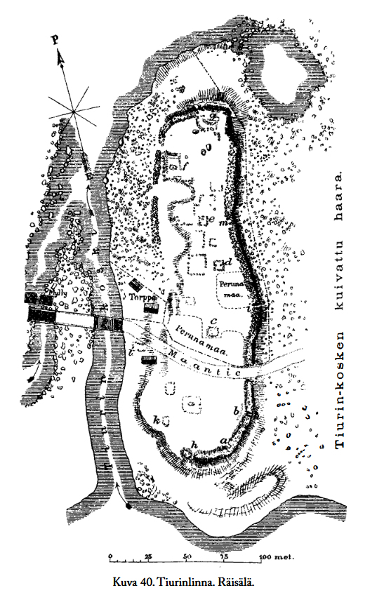 Piirros Tiurinlinnasta